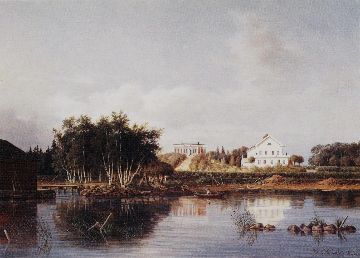 Magnus von Wright maalasi kesällä 1867 Furuhjelmin suvun tilauksesta kolme lähes identtistä maisemamaalausta Urjalassa sijaitsevan Honkolan kartanon päärakennuksesta, ja tämä on niistä ensimmäinen. Maalauksen osti vuonna 1986 Kansallis-Osake-Pankki ja se kuuluu nykyään Taidesäätiö Meritan kokoelmiin. Kahdesta muusta kopiosta toinen on edelleen Honkolan kartanossa ja toinen Ateneumin taidemuseossa Helsingissä.